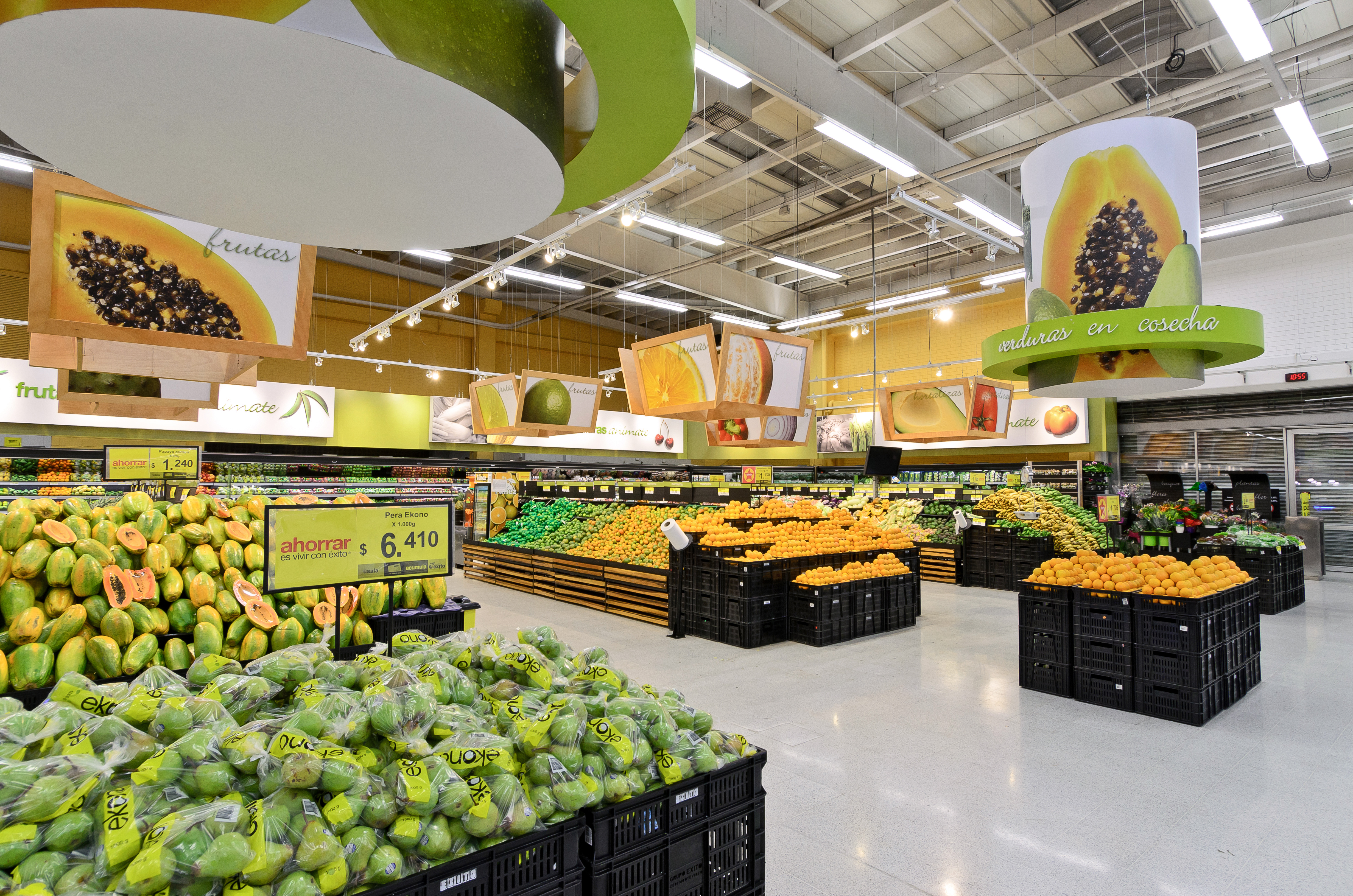 Intérieur Éxito en Colombie